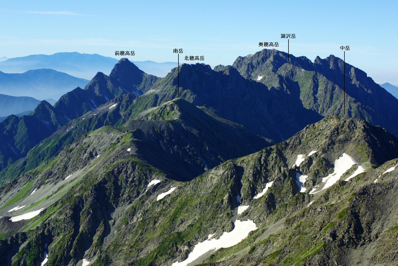 槍ヶ岳山頂から見た穂高連峰